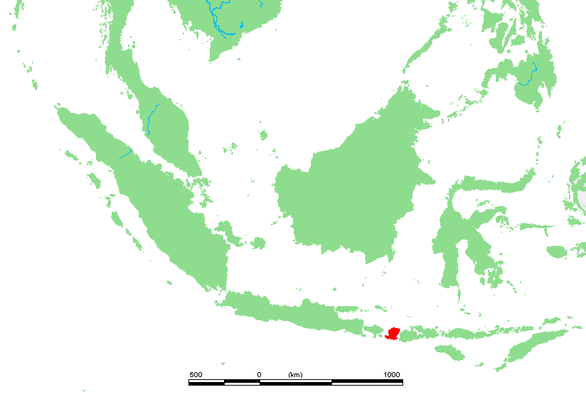 ID Tidore.PNG